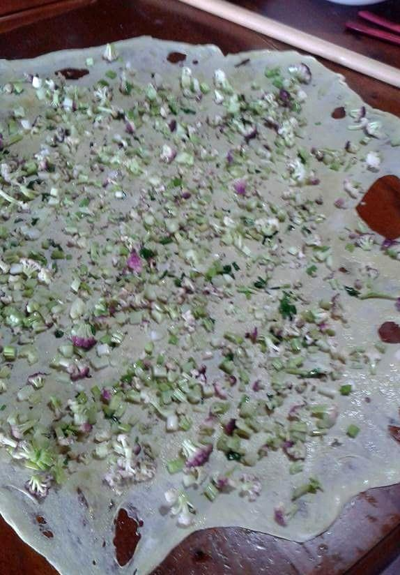 Pasta sfoglia delle 'mpanate stesa con il mattarello e con gli ingredienti sopra, i quali: cavolfiore, cipolla e prezzemolo